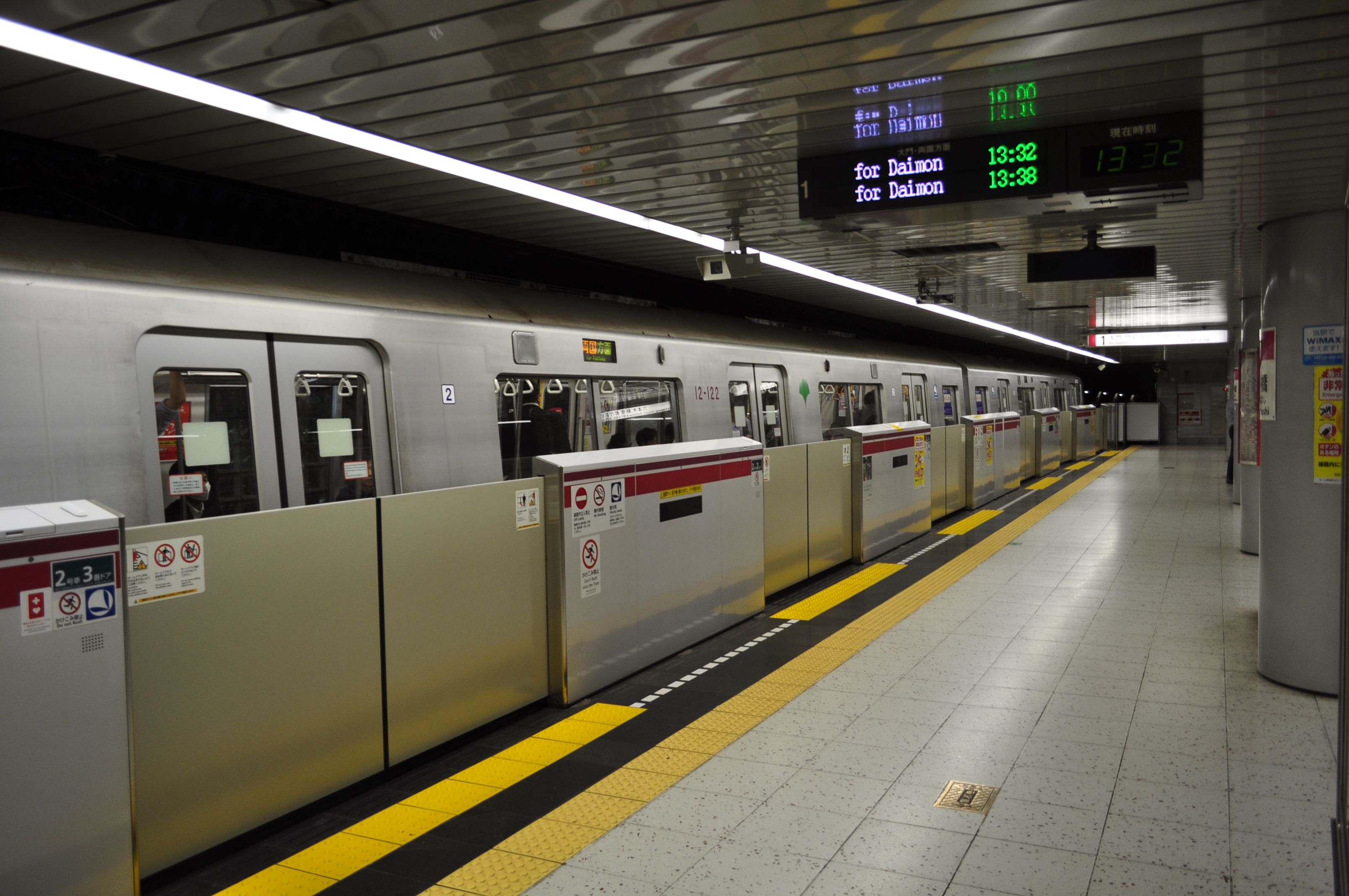 大江戸線 赤羽橋駅